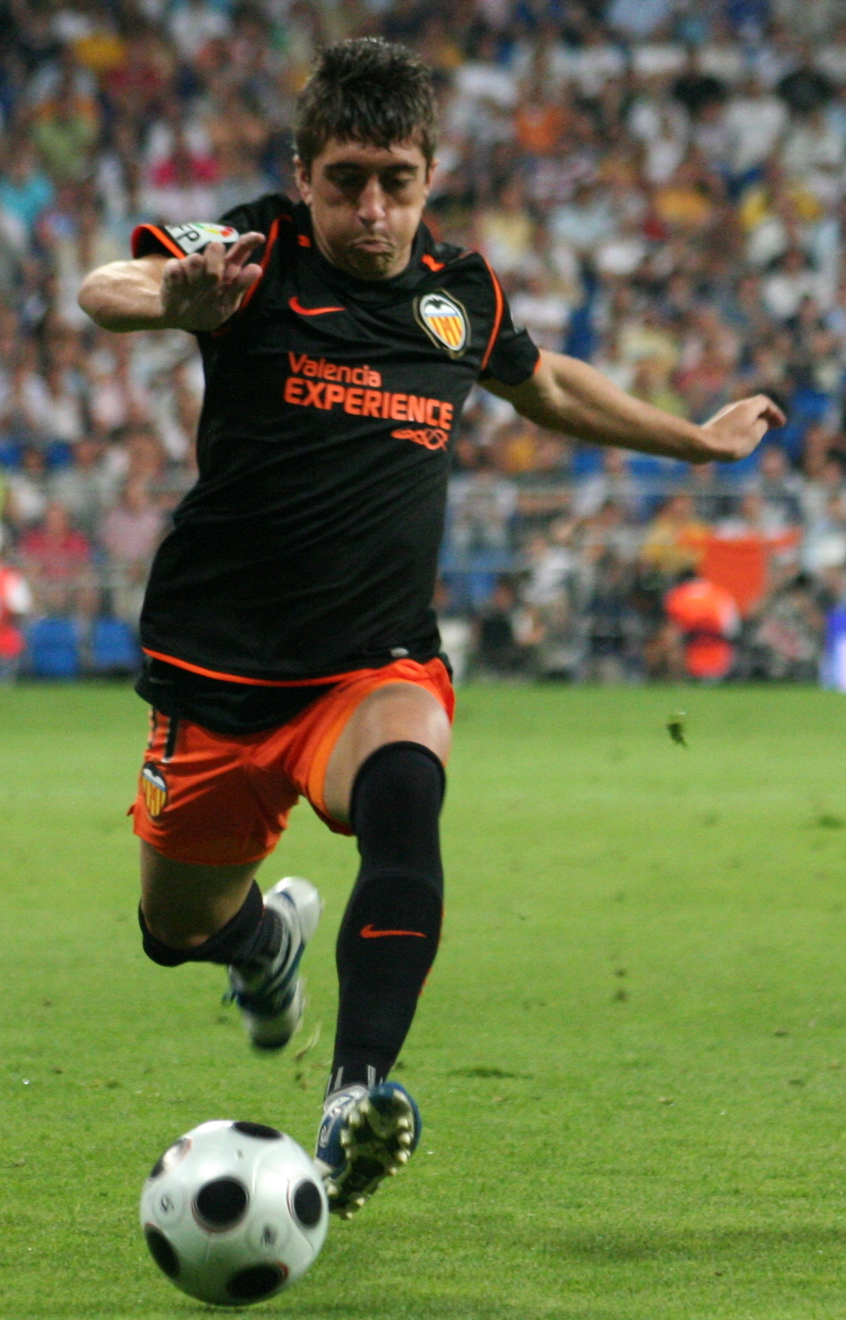 El jugador valencianista Pablo Hernández corre amb el baló